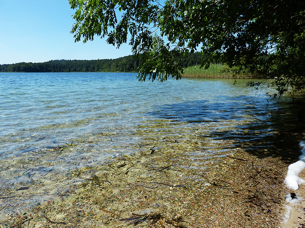 Großer Wummsee